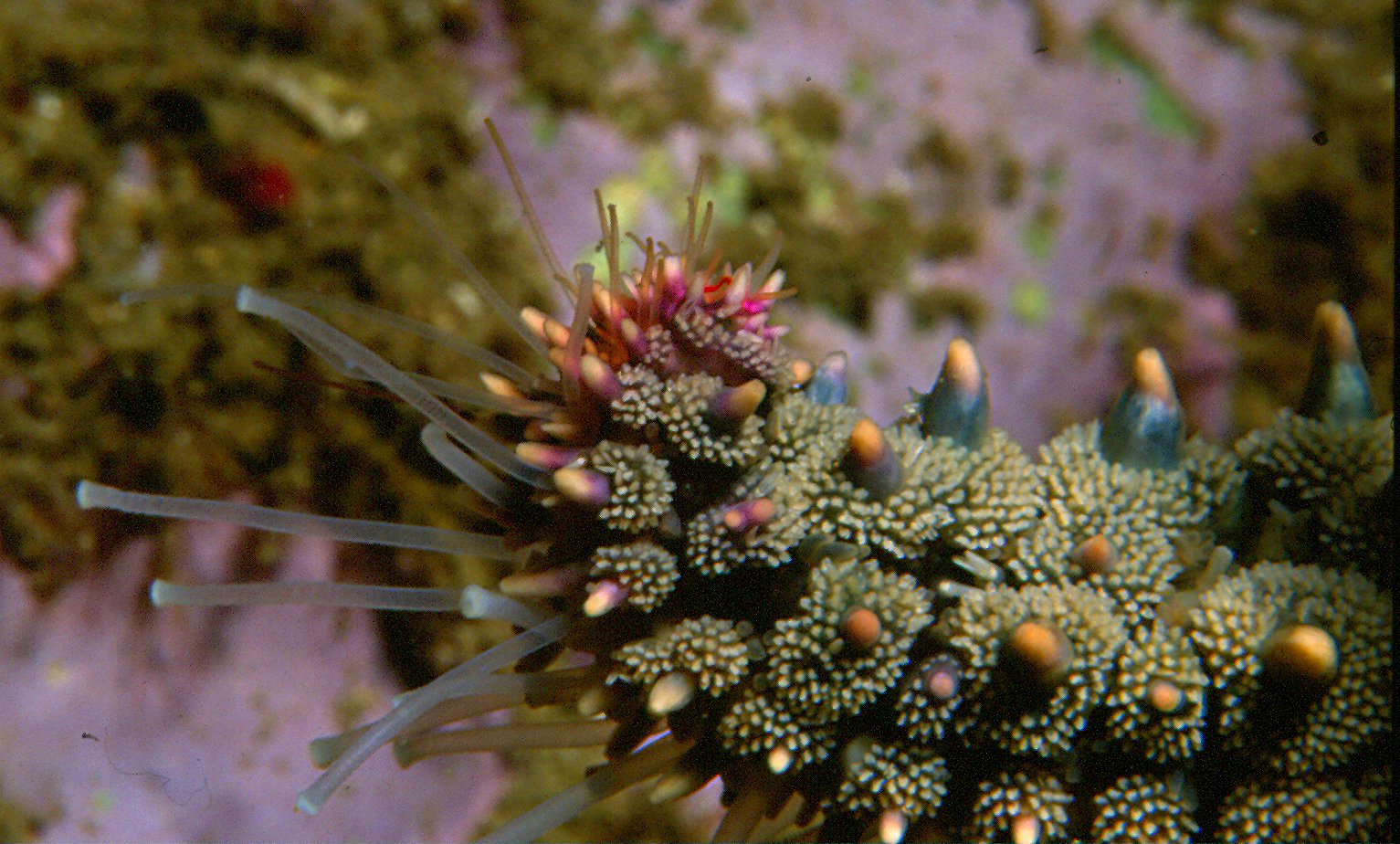 extrémité brachiale de Marthasterias glacialis montrant des épines, des pédicellaires, ainsi que les podia sensitifs